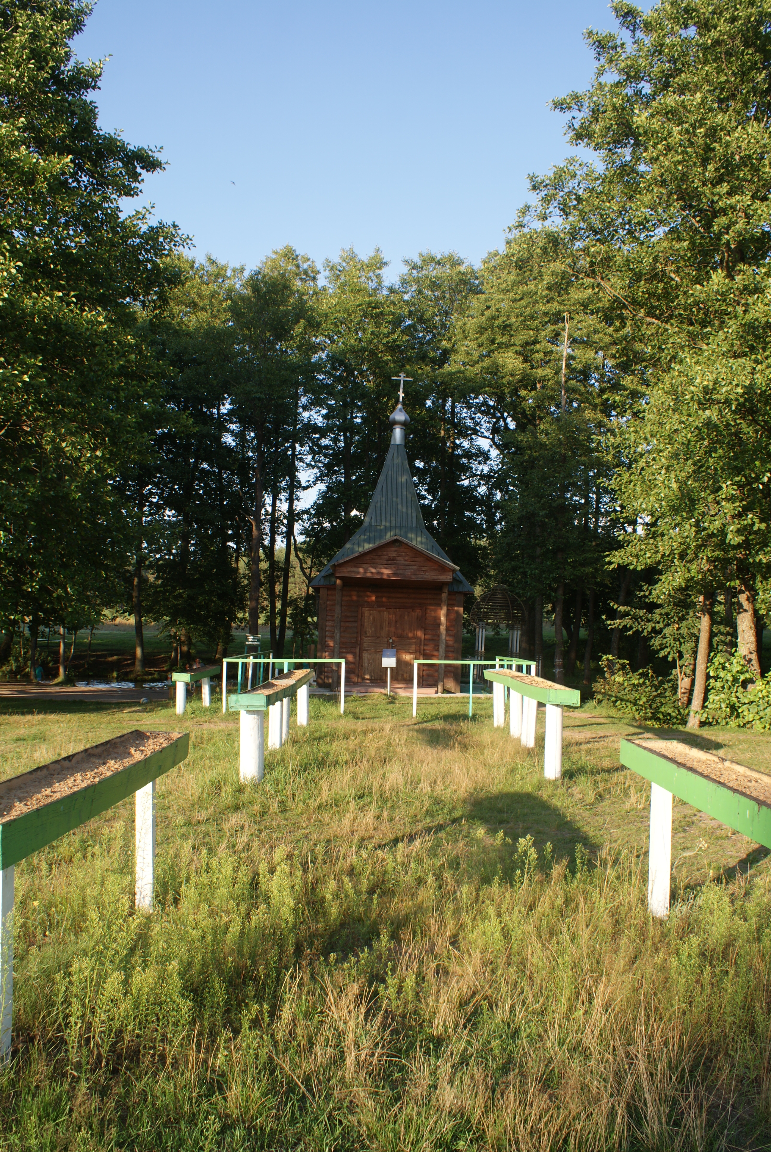 Блакітная крыніца